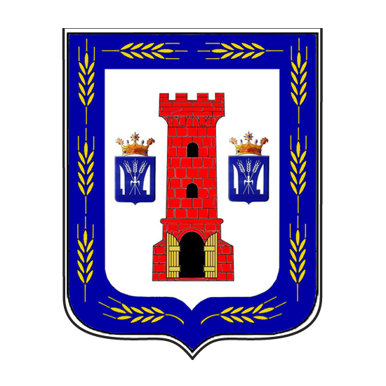 Grb Kule